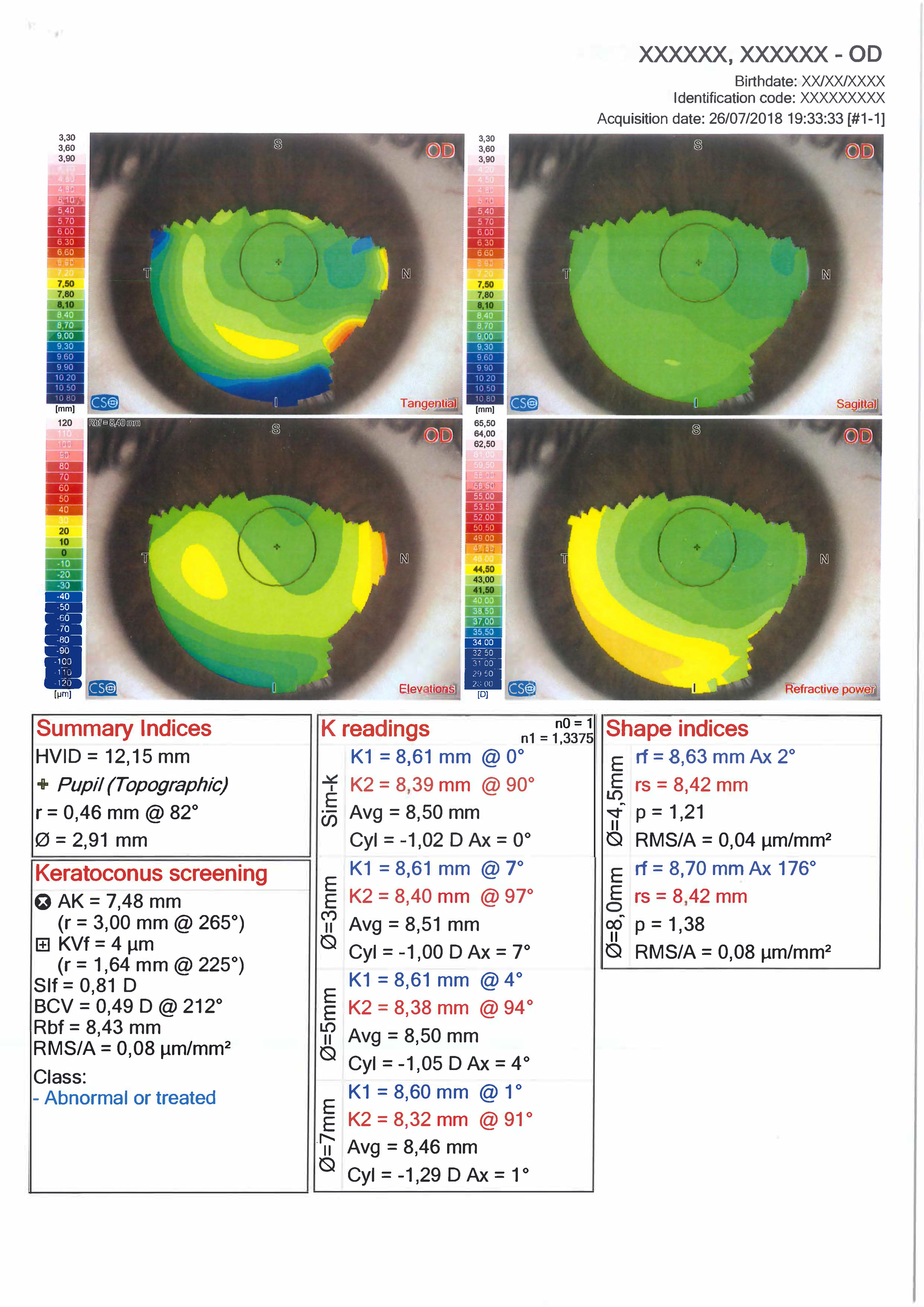 Topografia corneale; occhio trattato tramite Cheratectomia fotorefrattiva (PRK).